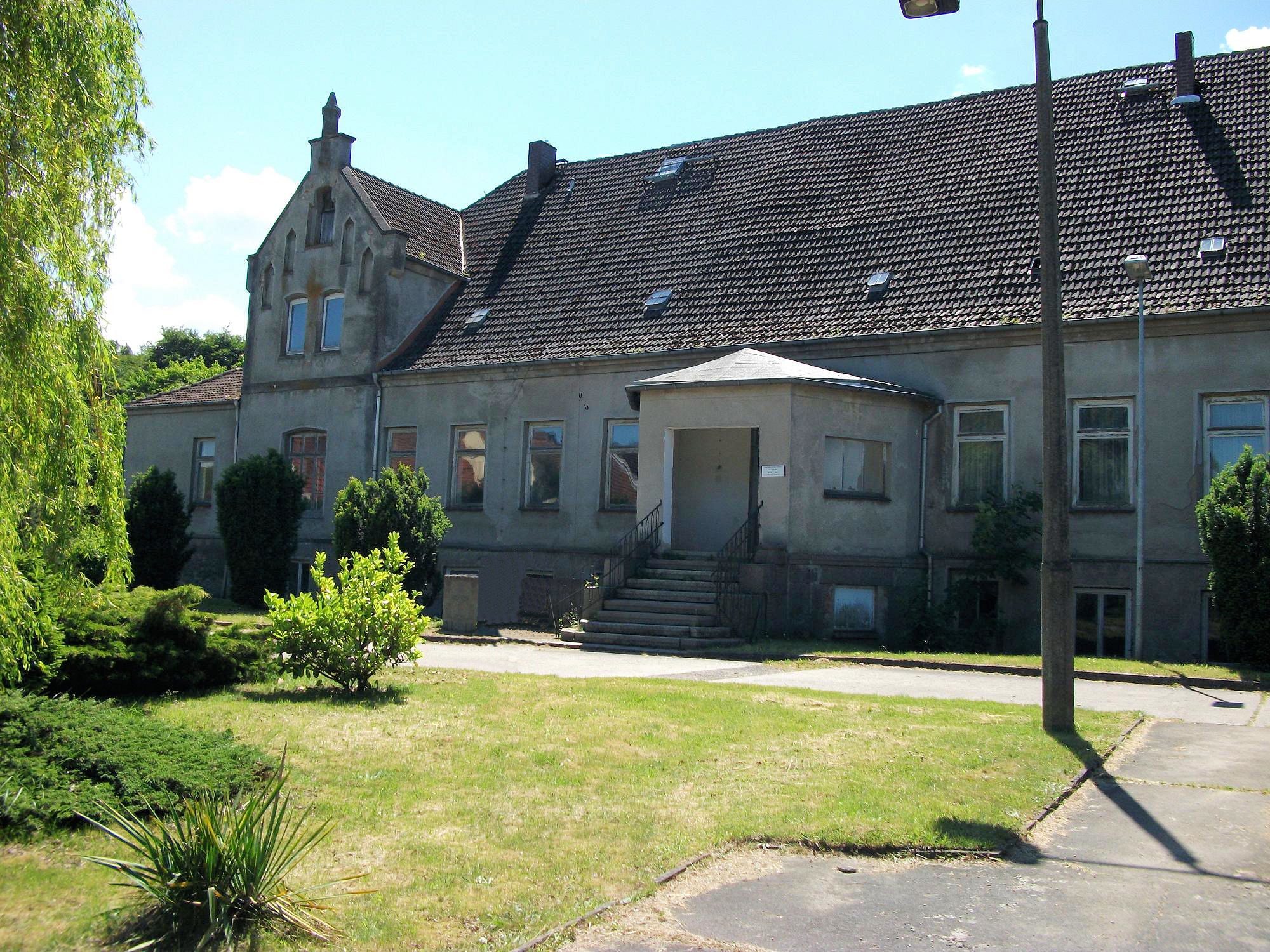 ehemaliger Gutshof der Familie v. Randow in Grammow